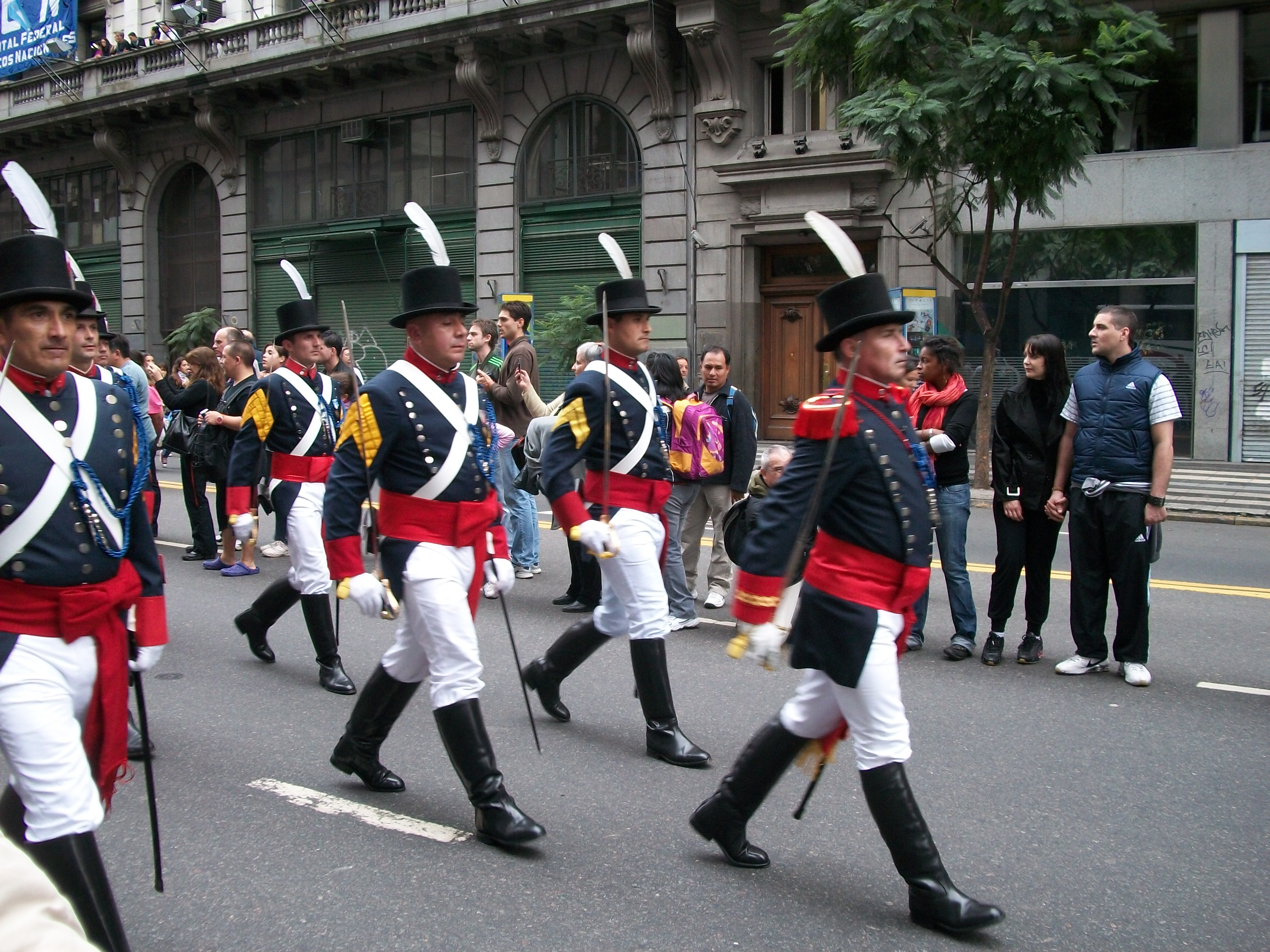 Celebracion del Bicentenario de Argentina